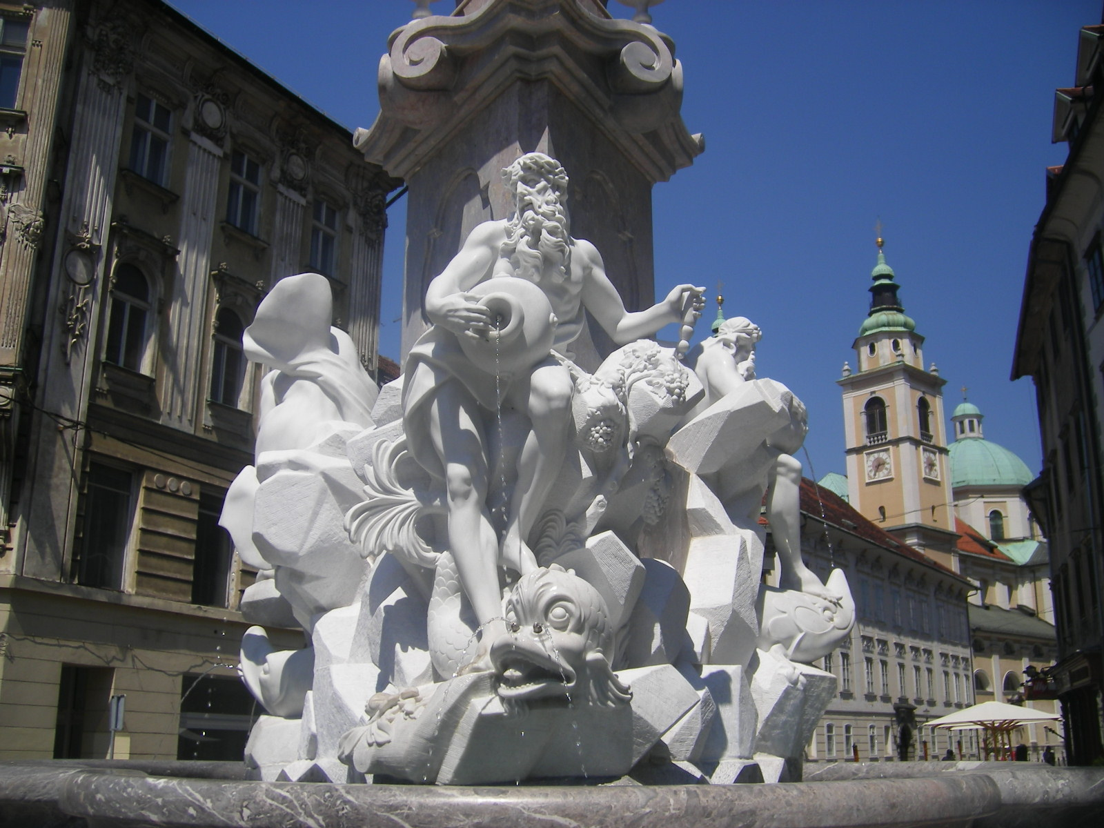 Ljubljana - Robba Fountain - a copy